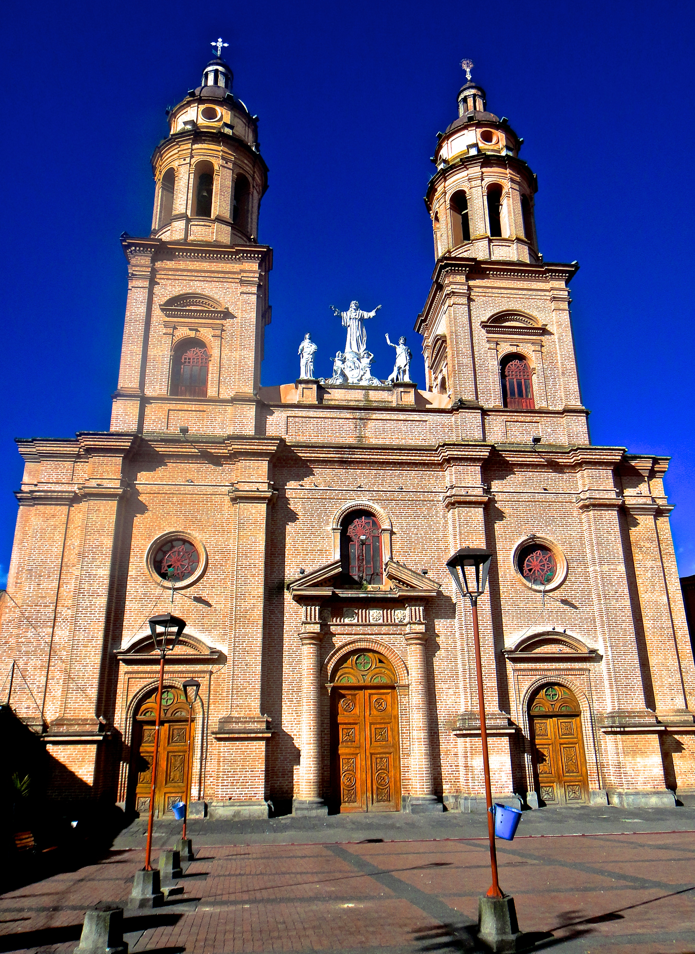 Catedral de Pasto (Nariño) Ubicación: Carrera 26 No. 17 PASTO, NARIÑO